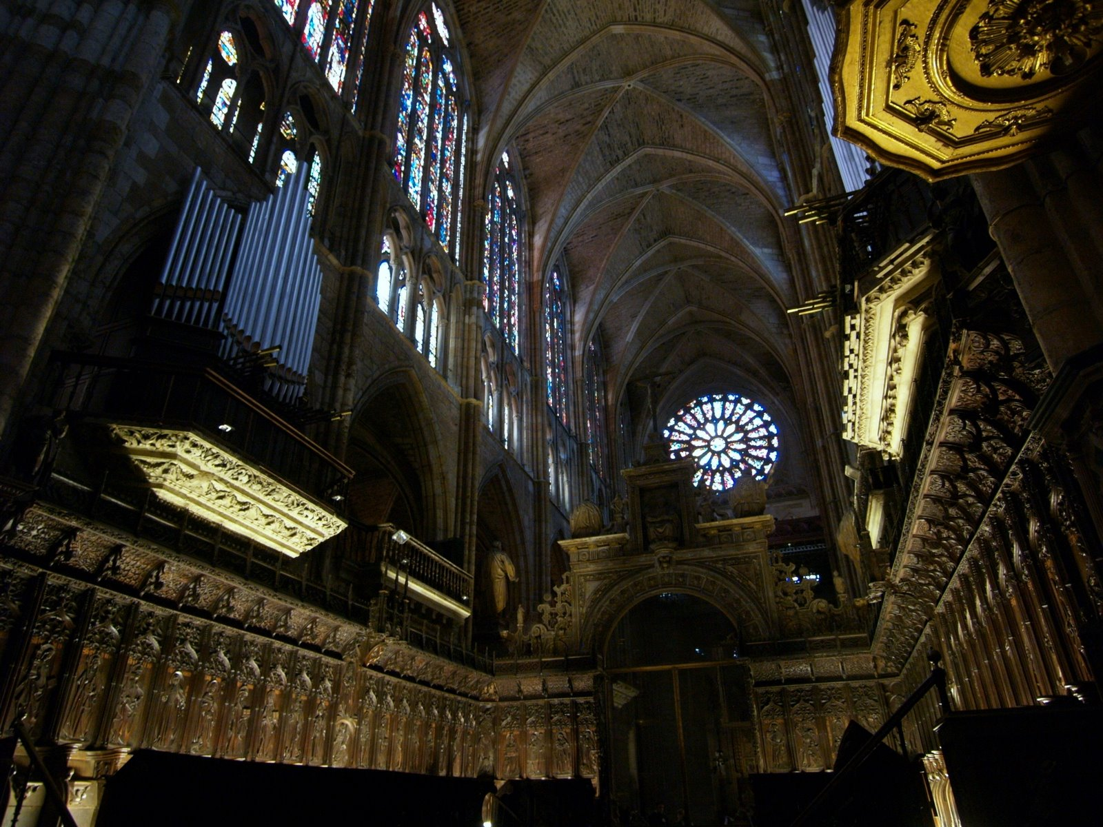 Coro y órgano de la catedral de León